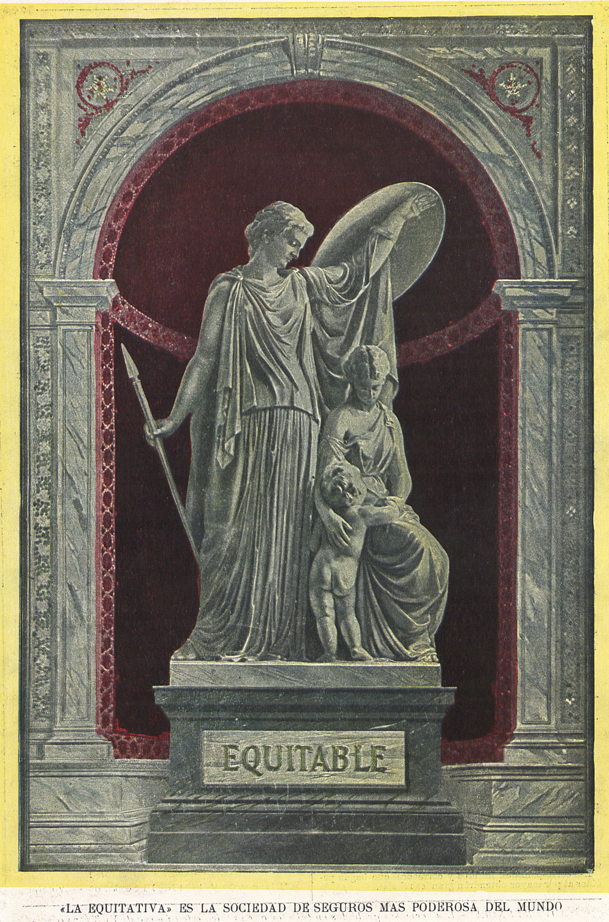 La Equitativa.